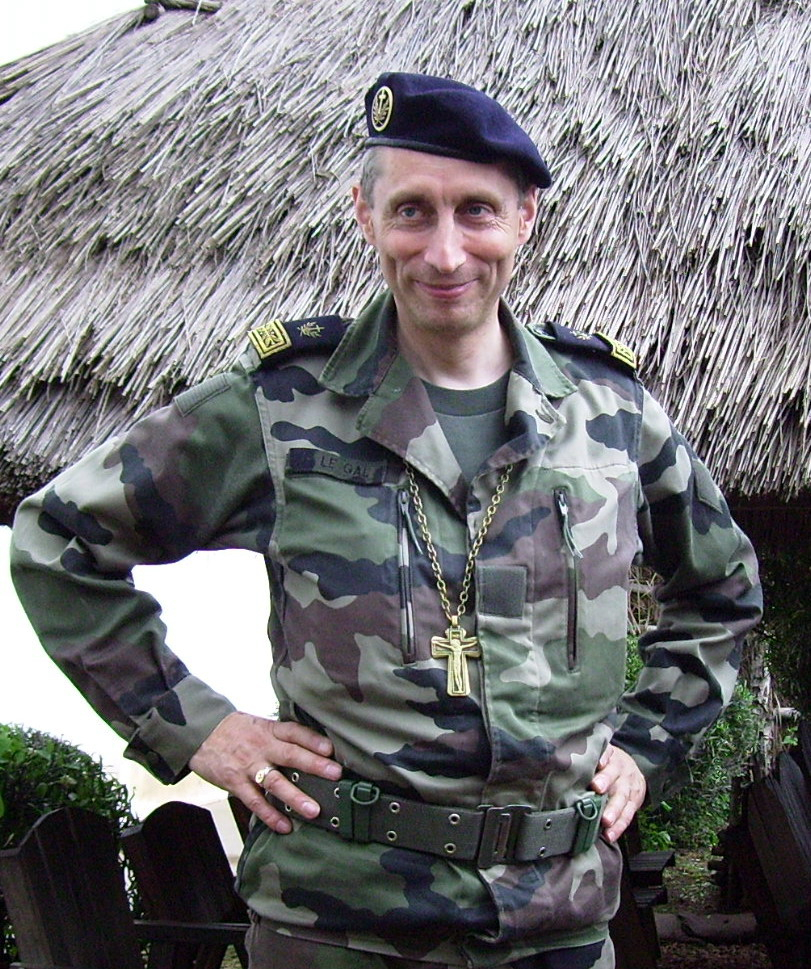 Mgr Patrick Le Gal, évêque aux Armées françaises